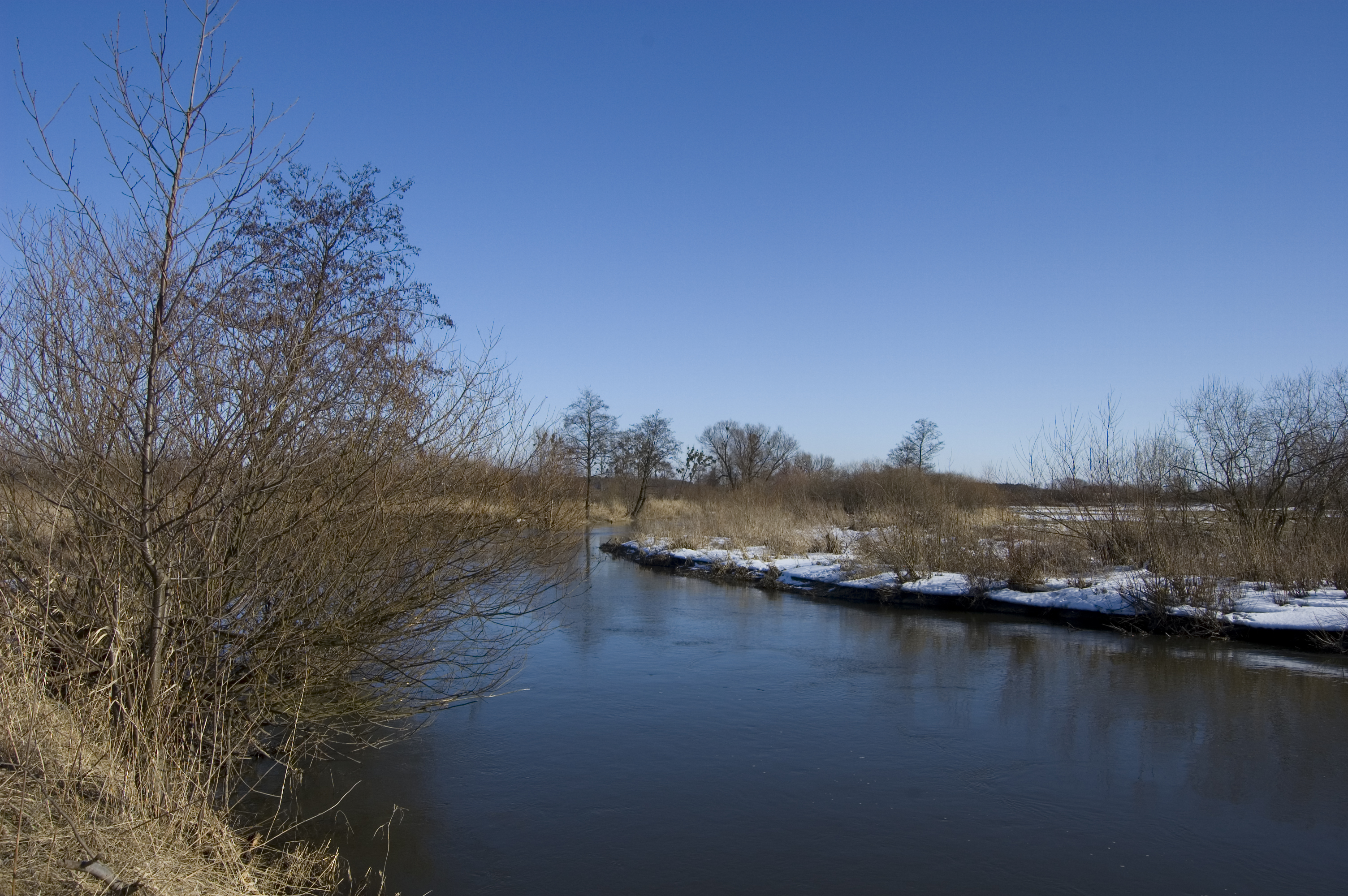 Rzeka Wieprz w okolicach Milejowa, Polska